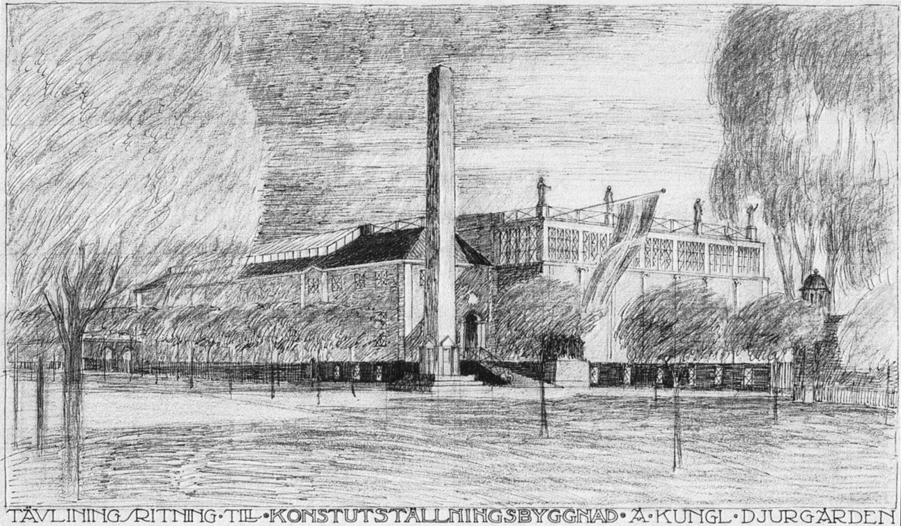 Skiss på Liljevalchs konsthall, Carl Bergstens tävlingsbidrag